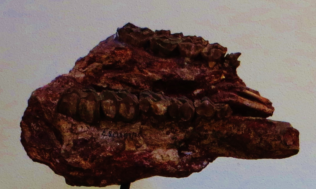 Fossil of Plagiolophus, an extinct mammal - Took the photo at Musee d'Histoire Naturelle, Paris